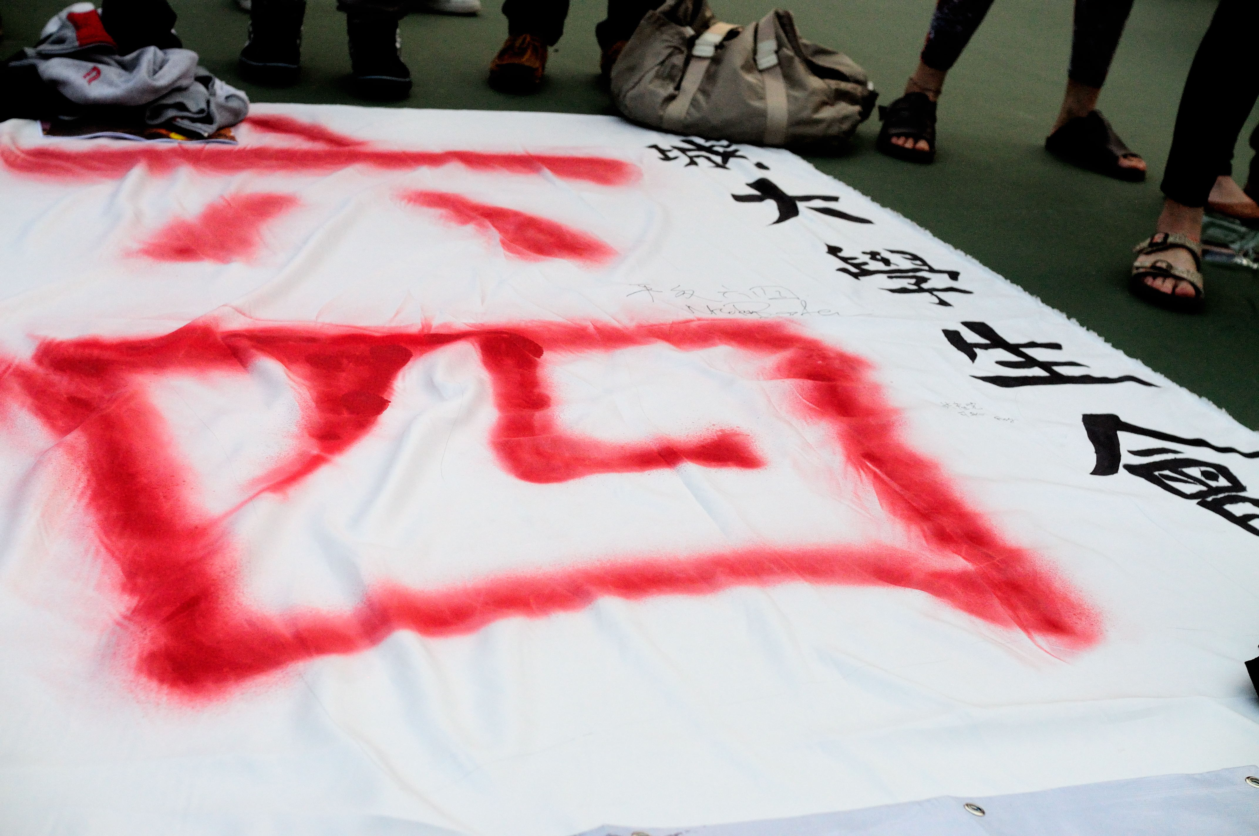 維園平反六四21週年燭光晚會 2010